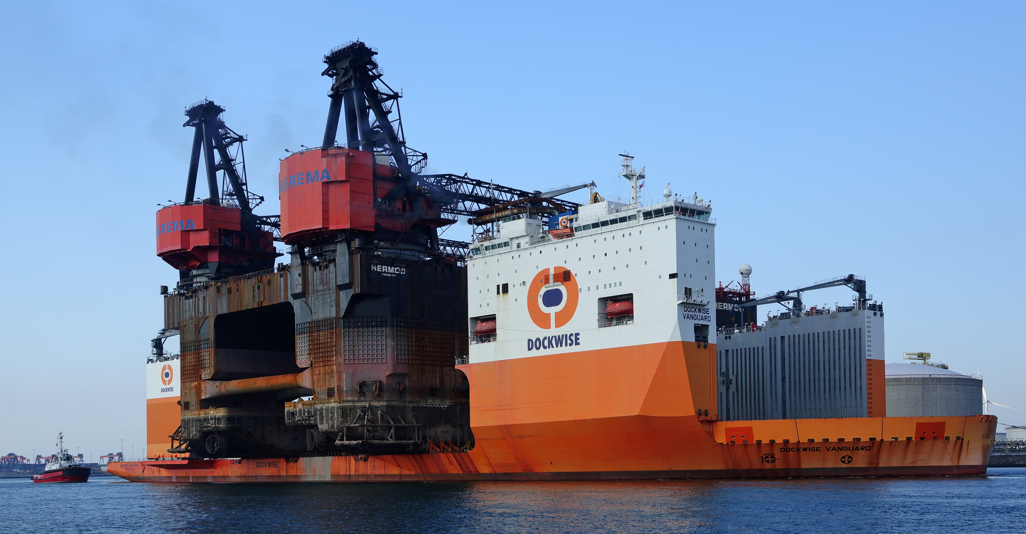 SMIT CHEETAH , ROTTERDAM en ADVENTURE assisteerden de DOCKWISE VANGUARD met vertrek van Maasvlakte 2 , bestemming Zhoushan in China.